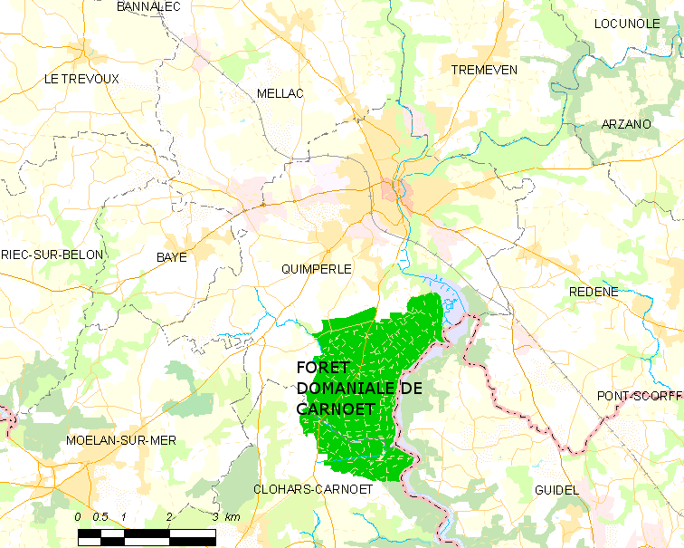 carte de la forêt de Carnoët d'après fichier open streetmap